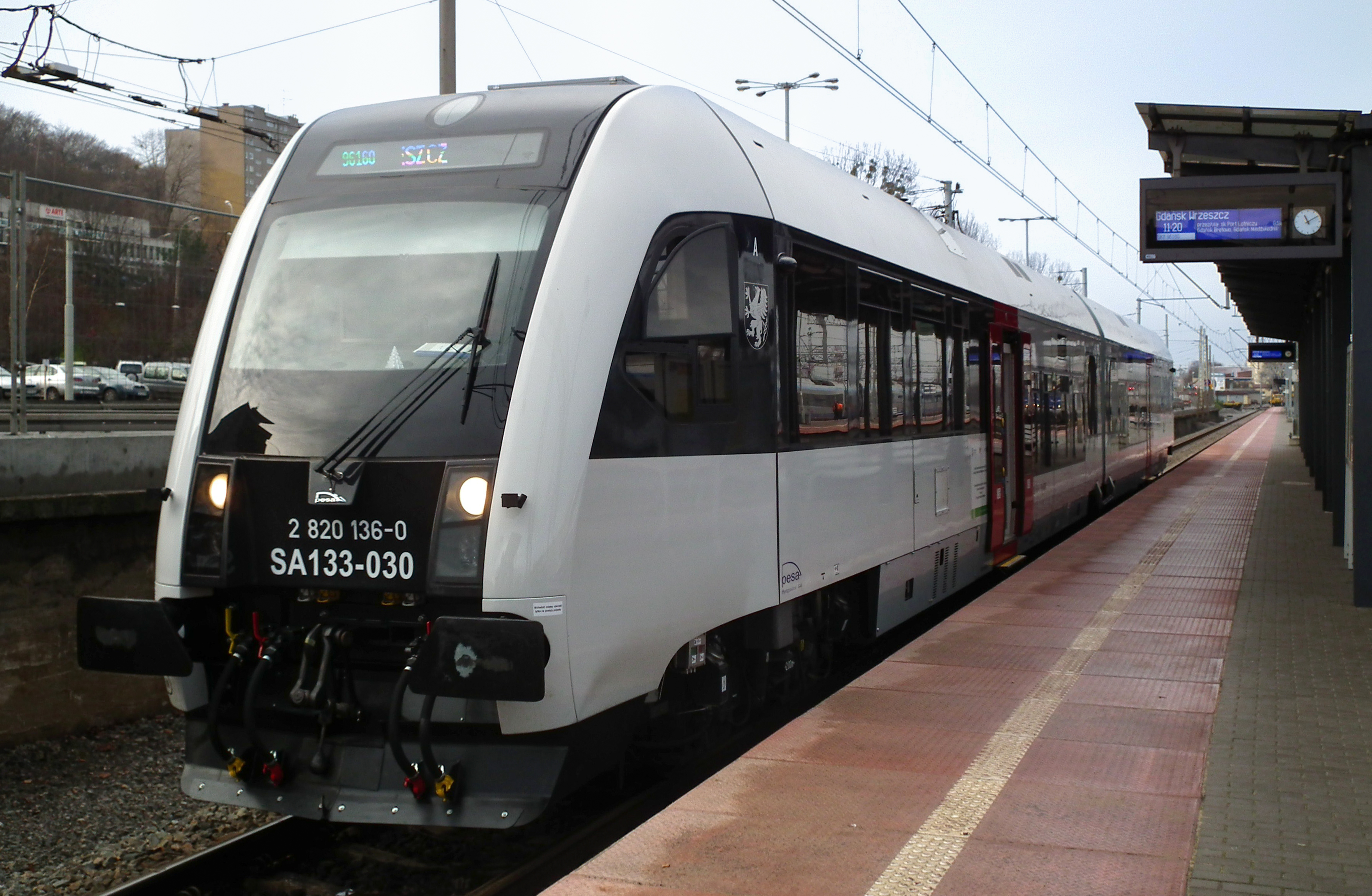 Gdynia Gł.